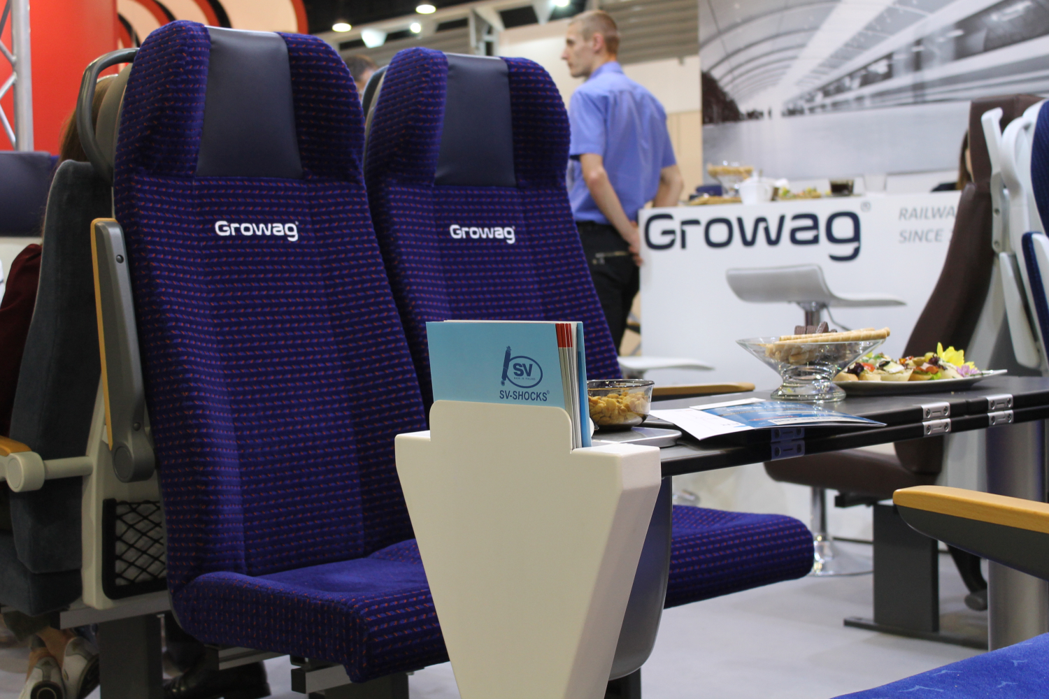 Fotele prezentowane przez Growag podczas targów Trako 2015. The making of this document was supported by Wikimedia Polska Association, within Wikigrant no. WG 2015-34. English | polski | +/−